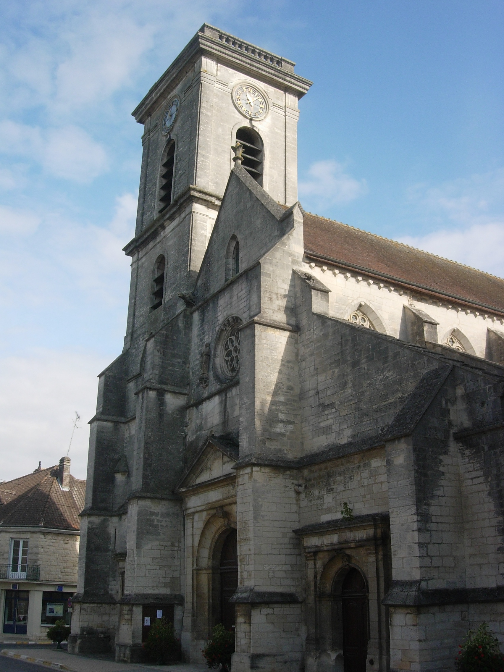 Eglise de Brienne-le-Château